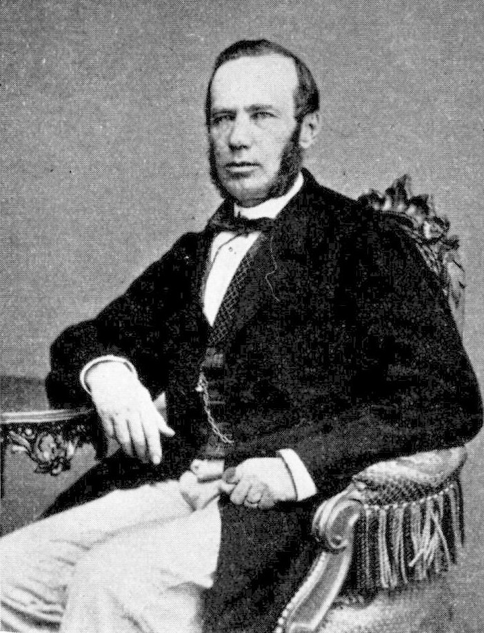 Fredrik August Cederschjöld (1813-1883), Swedish obstetrician